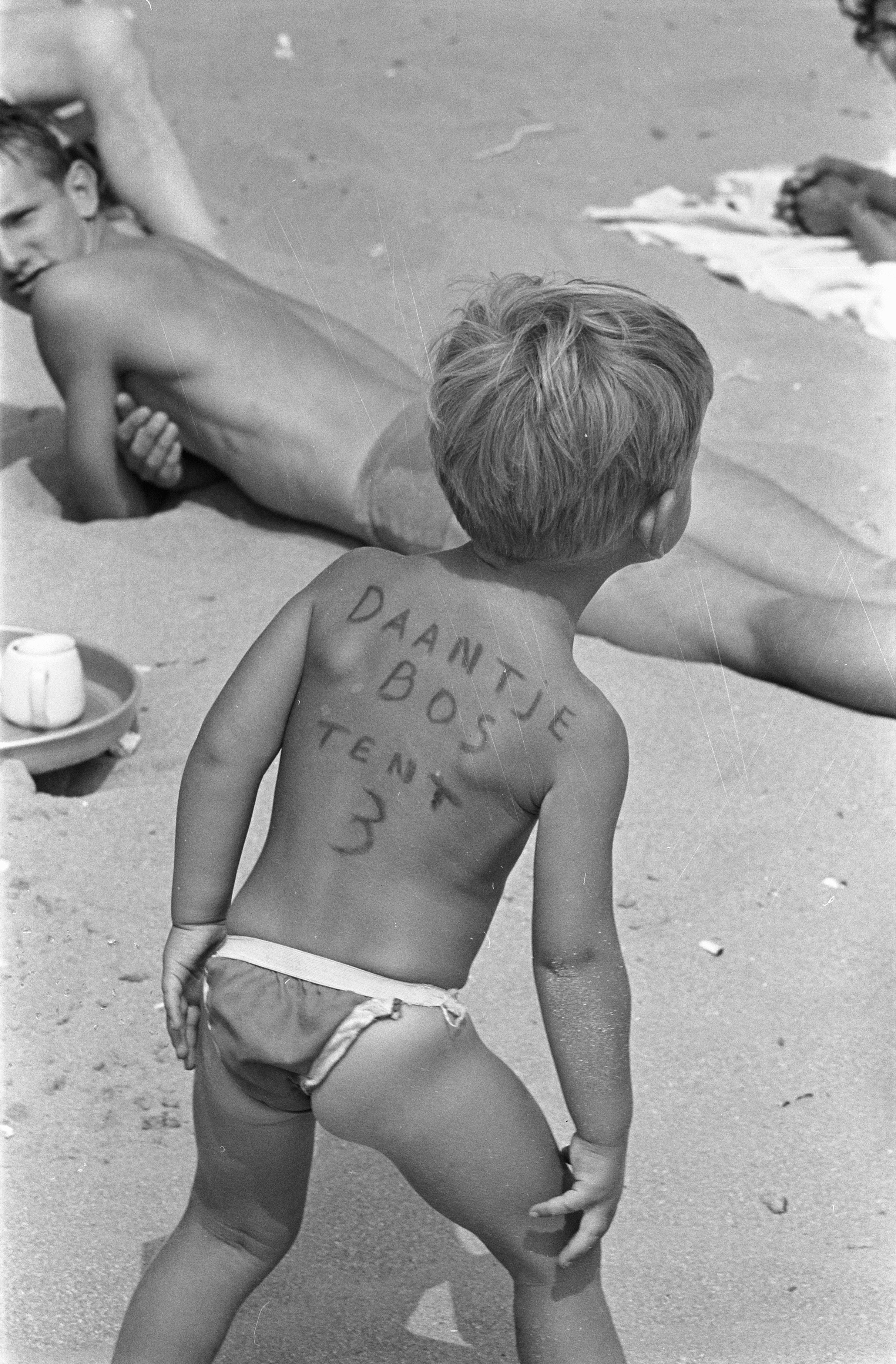 Collectie / Archief : Fotocollectie Anefo Reportage / Serie : [ onbekend ] Beschrijving : Drukte op Zandvoort, jongetje met naam op de rug Datum : 26 juli 1959 Fotograaf : Pot, Harry / Anefo Auteursrechthebbende : Nationaal Archief Materiaalsoort : Negatief (zwart/wit) Nummer archiefinventaris : bekijk toegang 2.24.01.05 Bestanddeelnummer : 910-5506